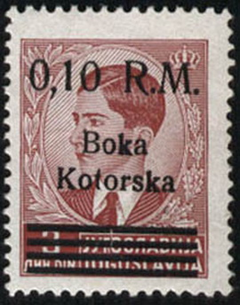 Почтовая марка немецкой администрации Котора (Черногория). Надпечатка на марке Югославии 1939 года. Stamp from the German administration of Kotor (Montenegro).